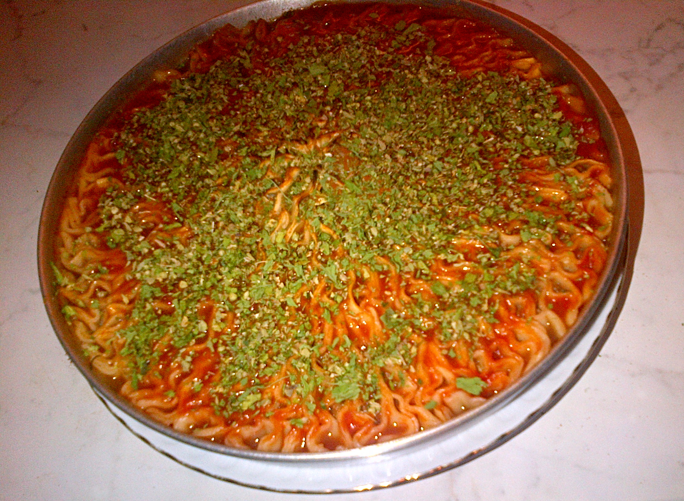 Turkish mantı just ready to serve, spices added.